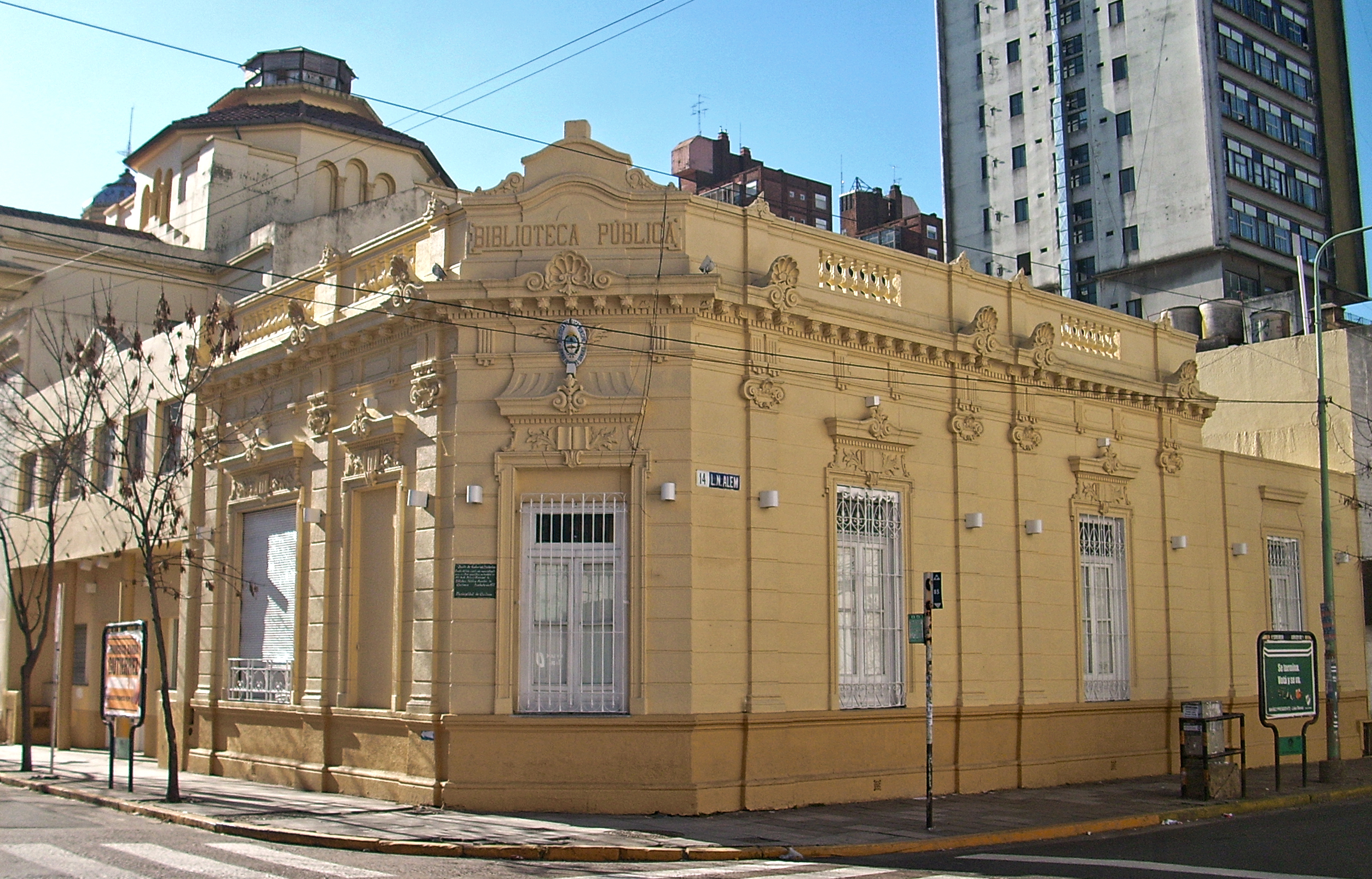 En la esquina de Mitre y Alem, el edificio original de 1904. A su derecha, la entrada (de construcción posterior). Más al fondo, la catedral. Del lado derecho de la imagen, la torre de la Escuela Municipal de Bellas Artes (EMBA), que anteriormente albergó a la Municipalidad de Quilmes.